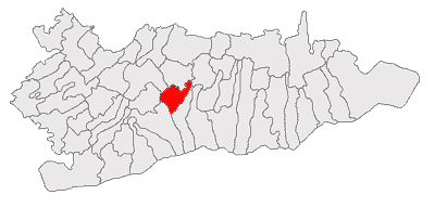 Categorie:Hărţi ale judeţului Călăraşi